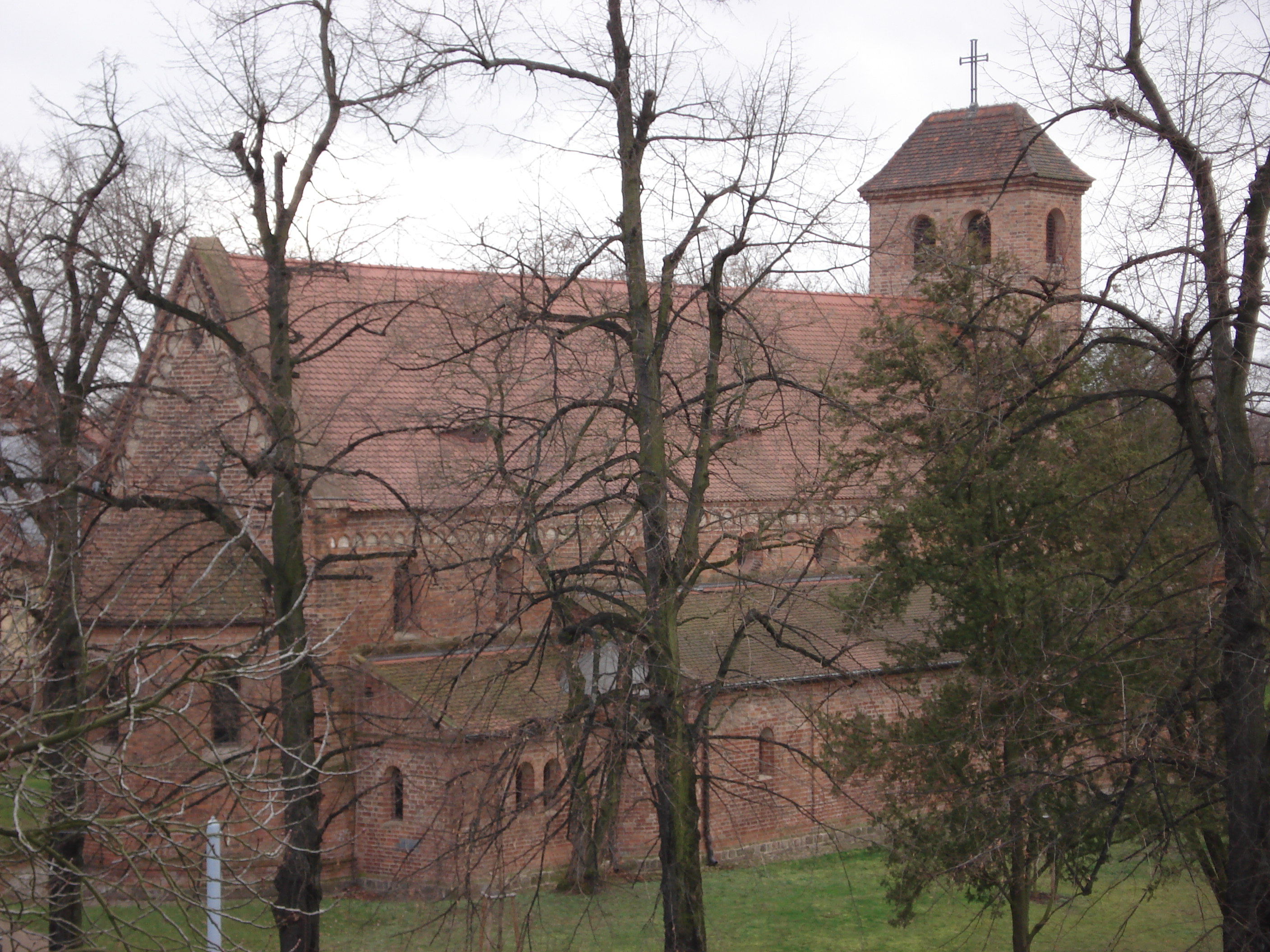 Die Nikolaikirche des ehemaligen Dorfes Luckenberg in Brandenburg an der Havel